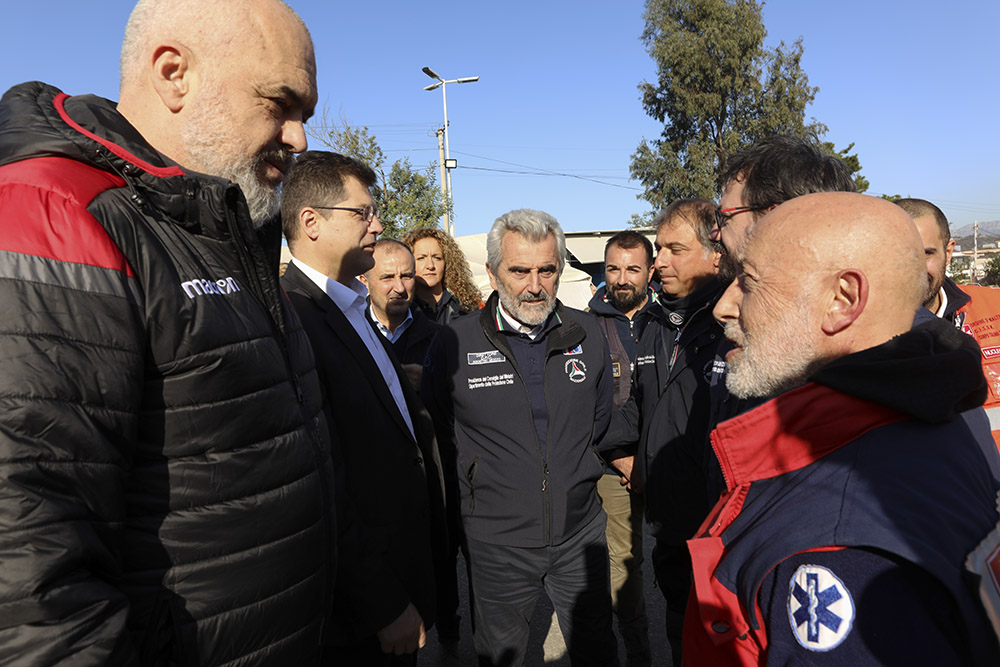 Vorë (Tirana), 5 dicembre 2019 – Il Primo Ministro dell'Albania Edi Rama e il Commissario europeo per la gestione delle crisi Janez Lenarcic visitano l'area di accoglienza di Vorë con il Direttore del Dipartimento della Protezione Civile Agostino Miozzo. Il Sistema Nazionale di Protezione Civile si è attivato, su disposizione del Presidente del Consiglio dei Ministri, nell’ambito del Meccanismo Europeo per rispondere alla richiesta di intervento pervenuta dalle autorità albanesi in seguito alla scossa di magnitudo 6.5 che il 26 novembre ha colpito il Paese.